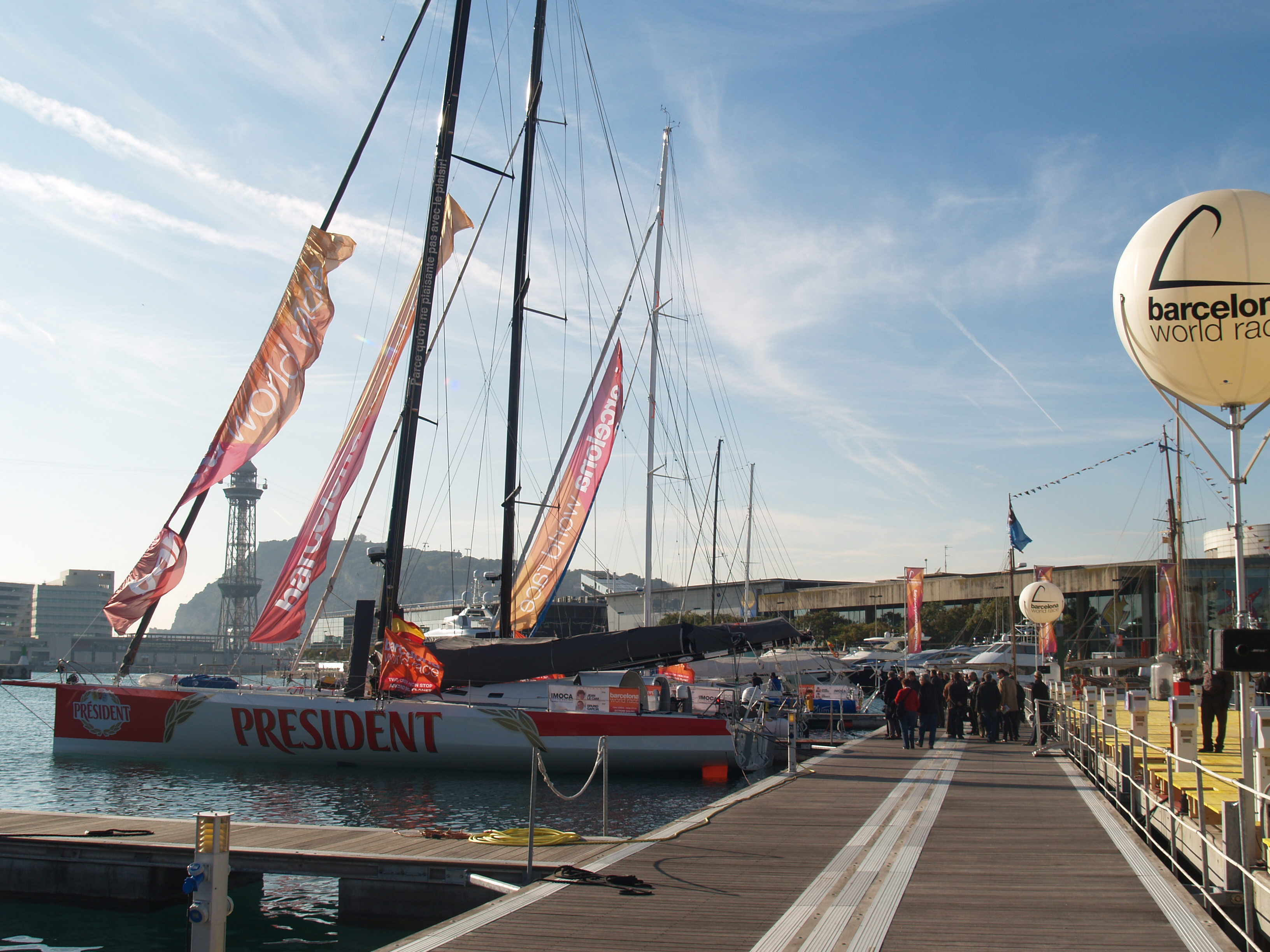 PC190289